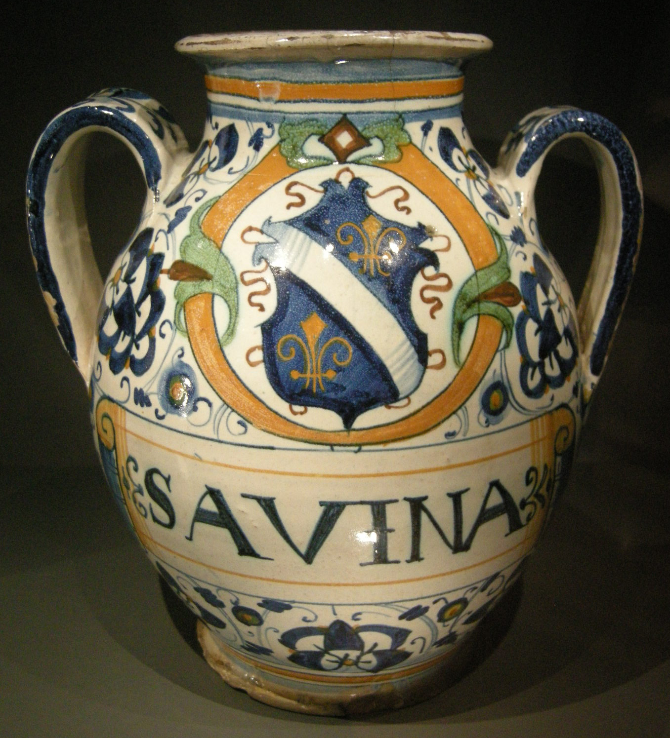 Ngv, maiolica di montelupo, contenitore da farmacia per savina, 1520 circa